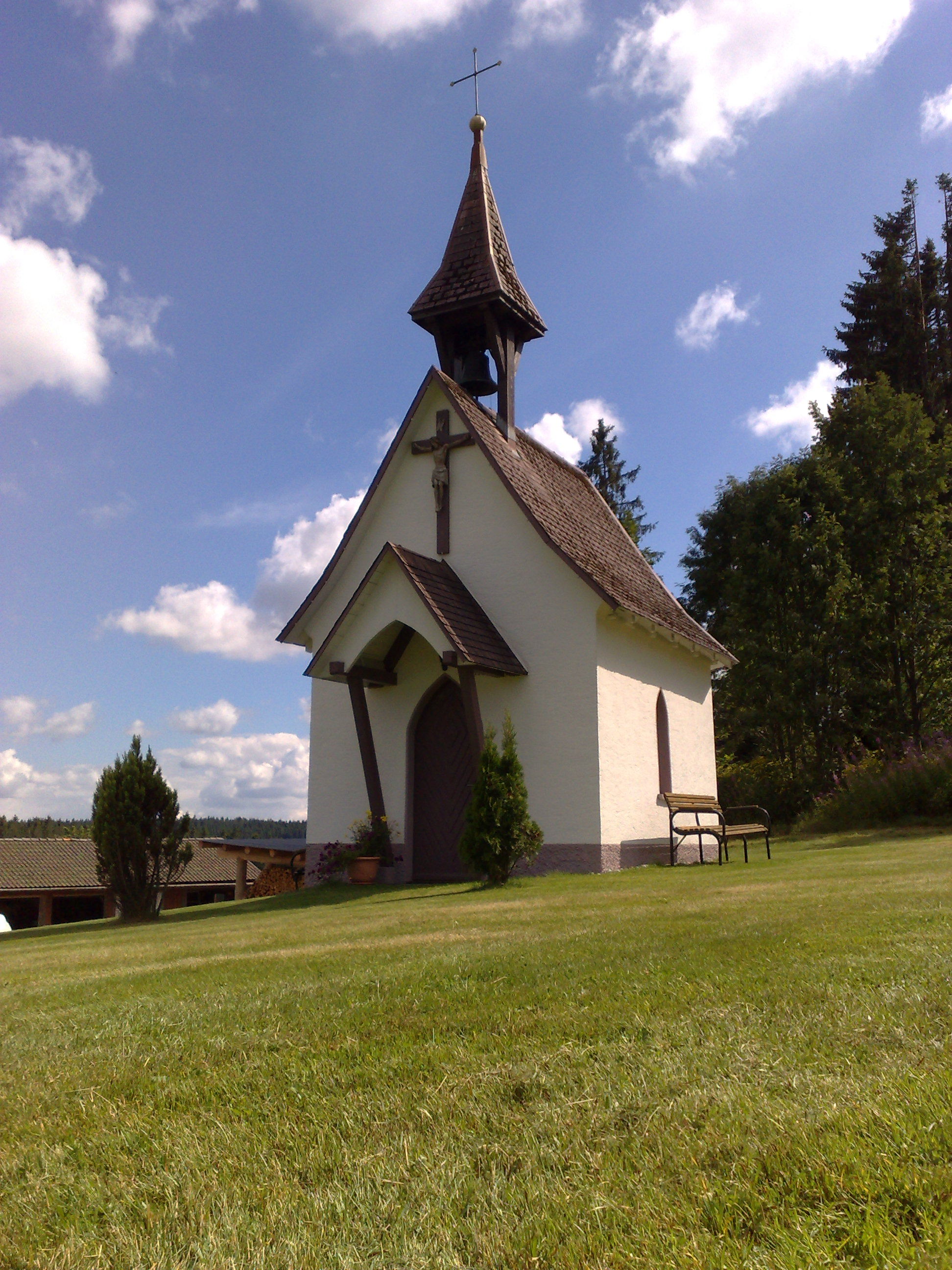 Gutenkapelle